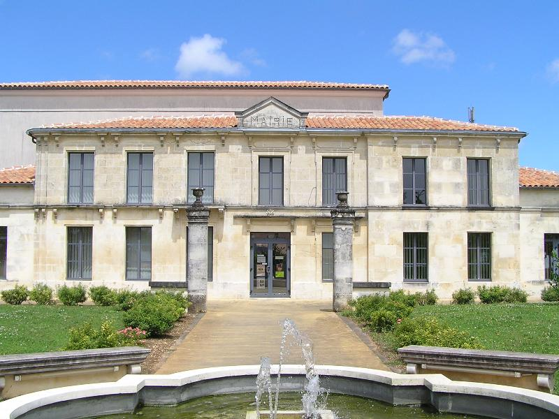 Mairie de Cherves